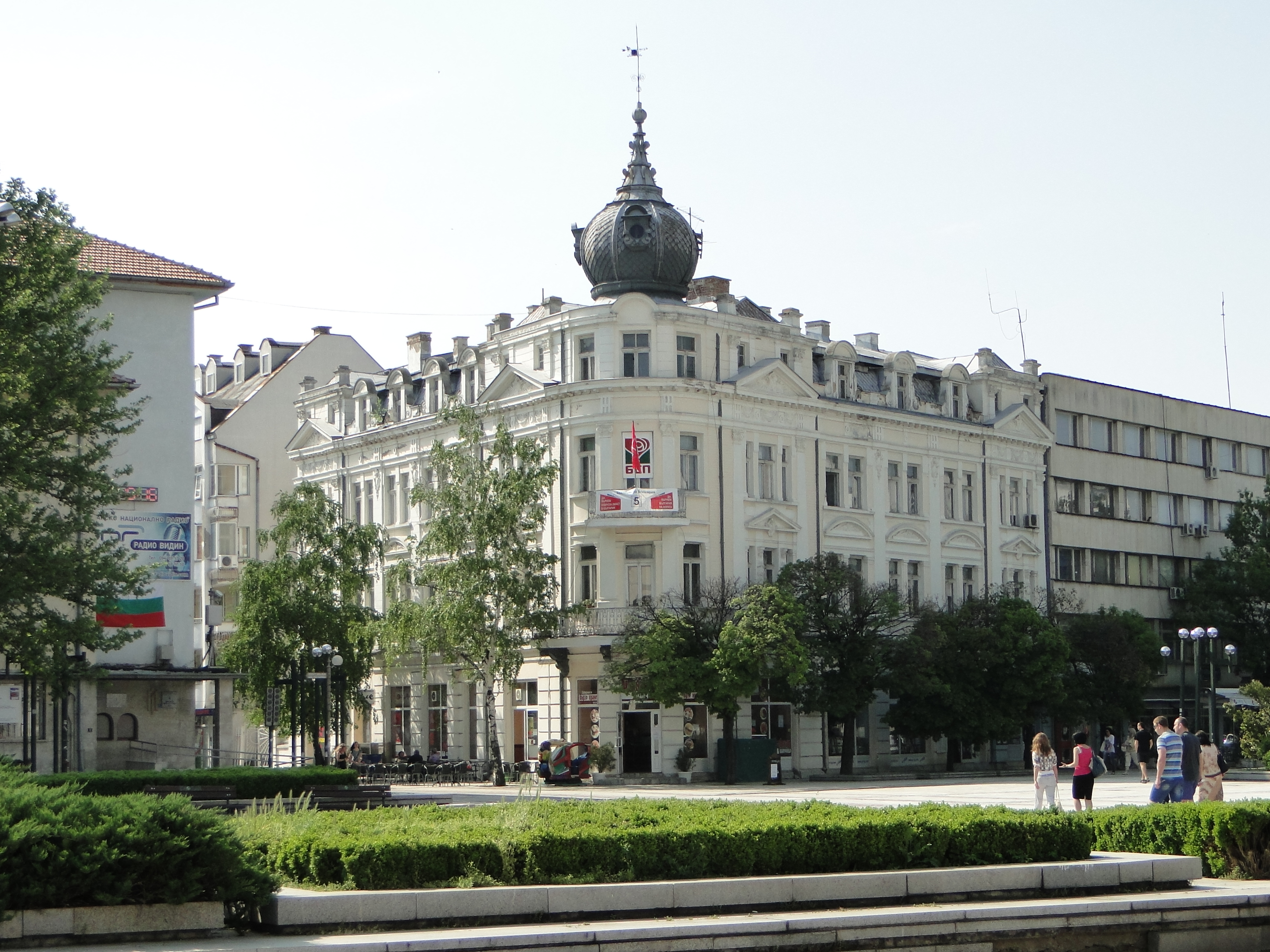 Видин, май 2013